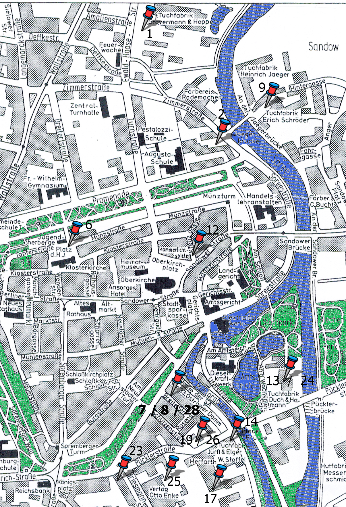 Stadtkarte 1938.1.2